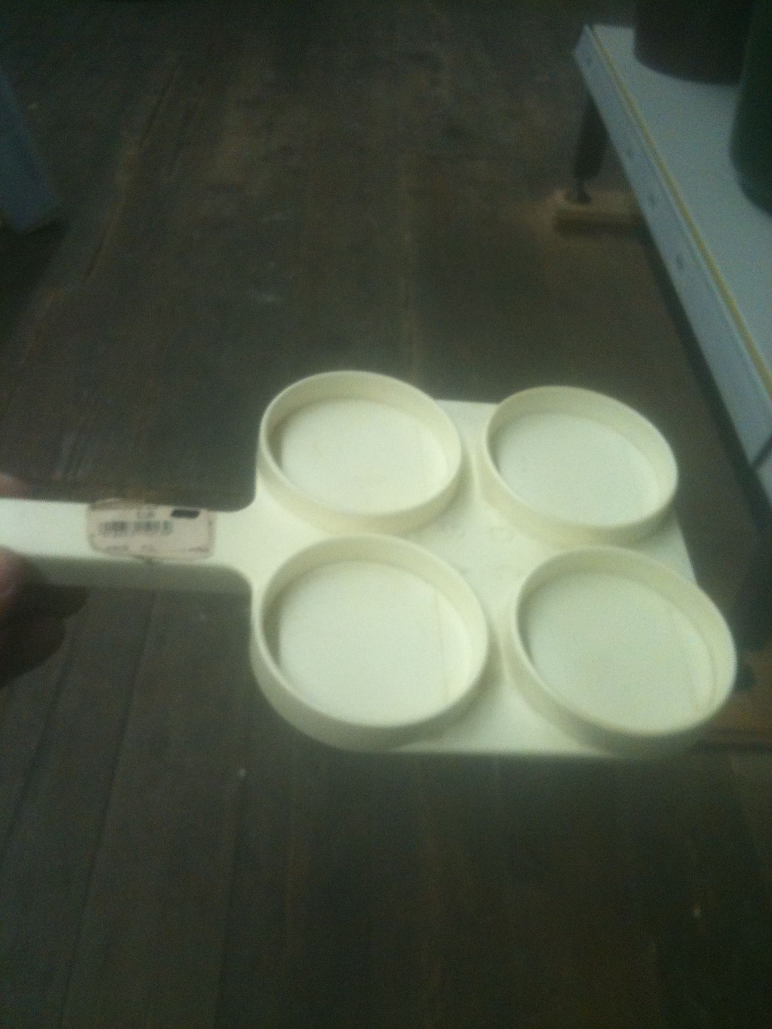 Schalmtestplatte zur Durchführung eines California Mastitis Test.